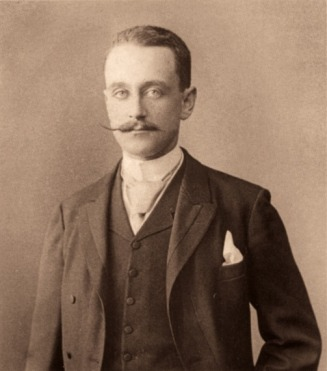 Hugo Alfons kníže Dietrichstein-Mensdorff-Pouilly